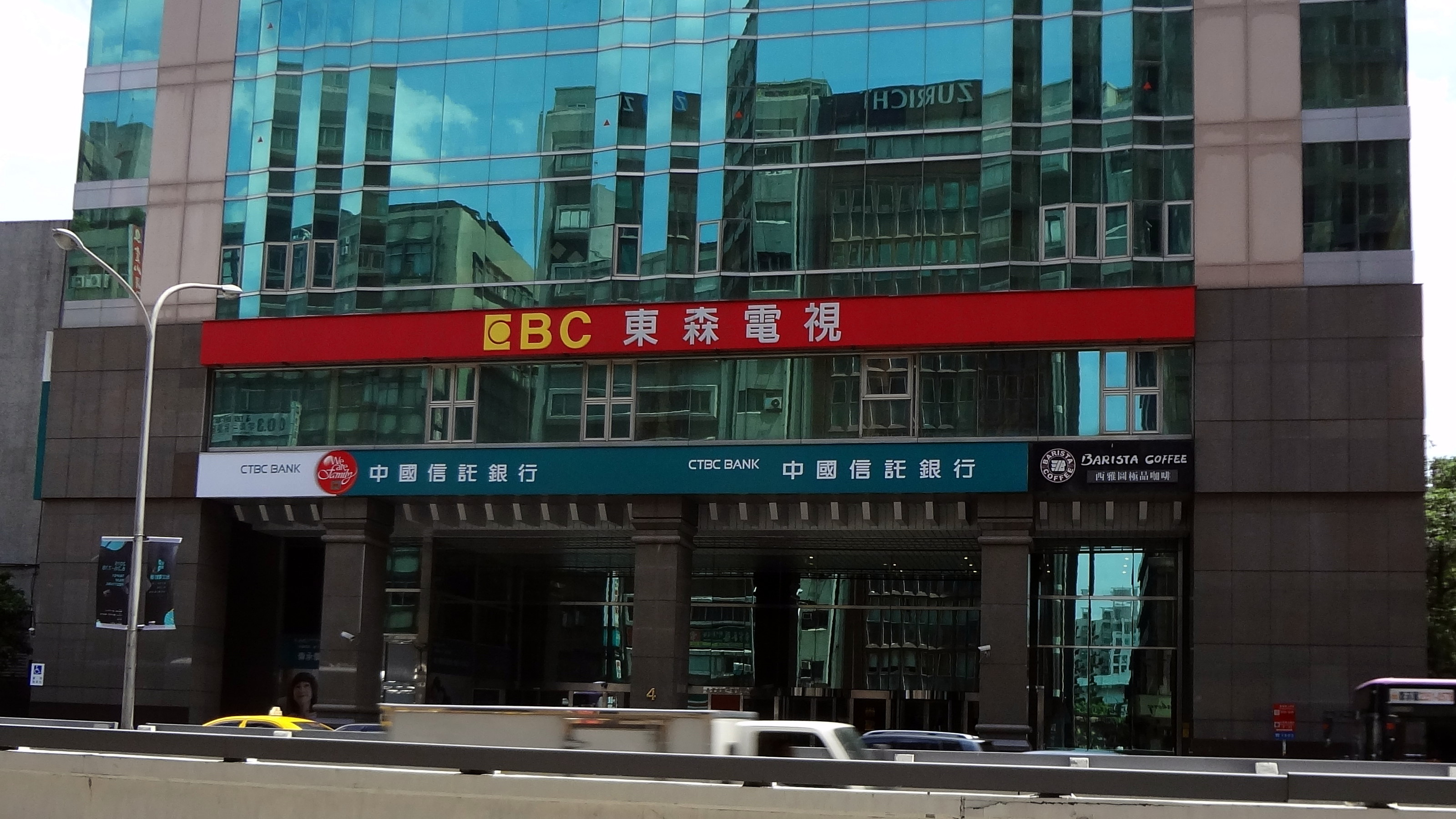 崇聖大樓是東森電視總部、中國信託商業銀行站前分行、西雅圖極品咖啡崇聖店的共同所在地。